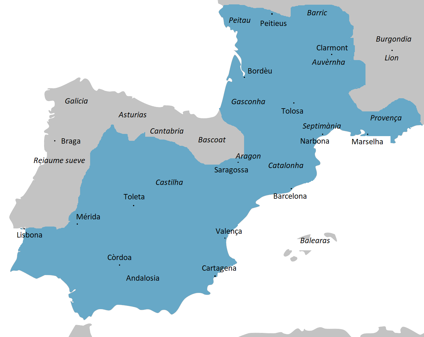 Reiaume visigòt d'Alaric II (vèrs 500).